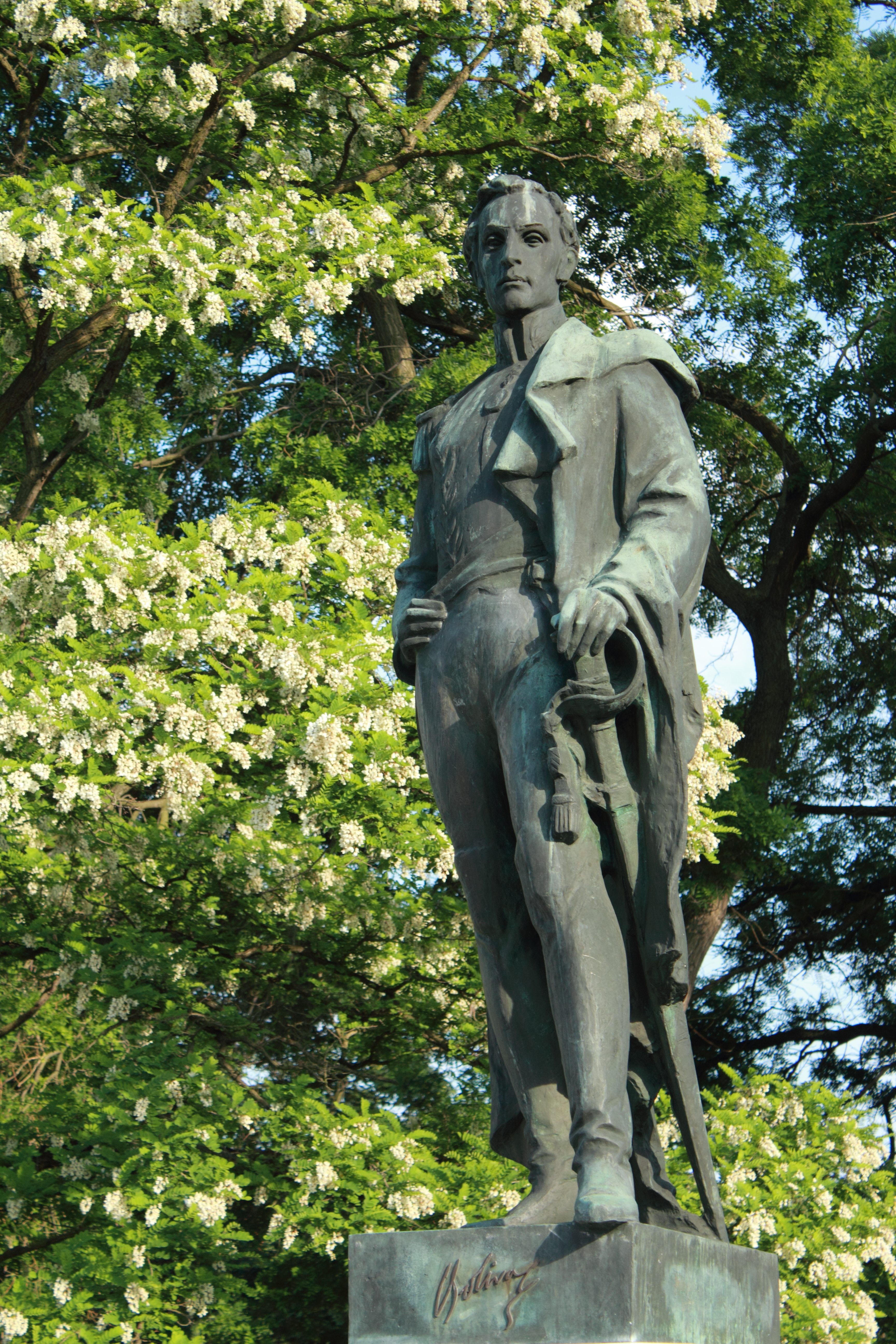 Socha Simóna Bolívara (Jan Hána), součást Bolívarova pomníku v parku Generála Lázaro Cárdenase, Praha-Bubeneč